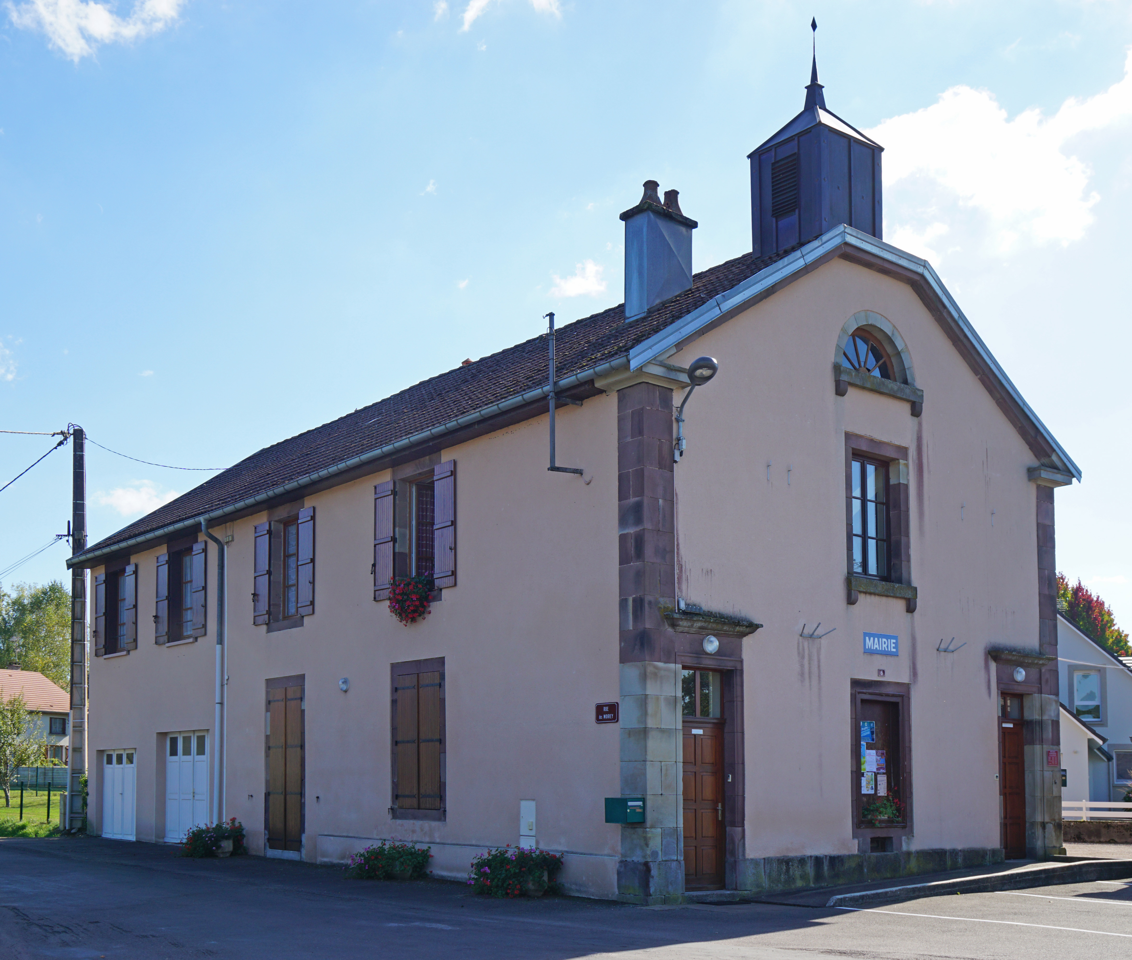 La mairie d'Esboz-Brest.